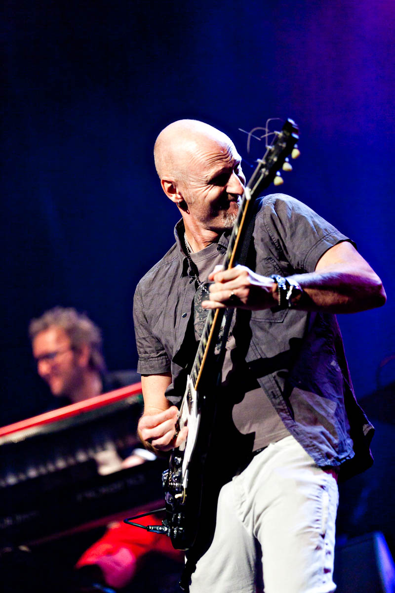 Skånska Maffian live i Hässleholm